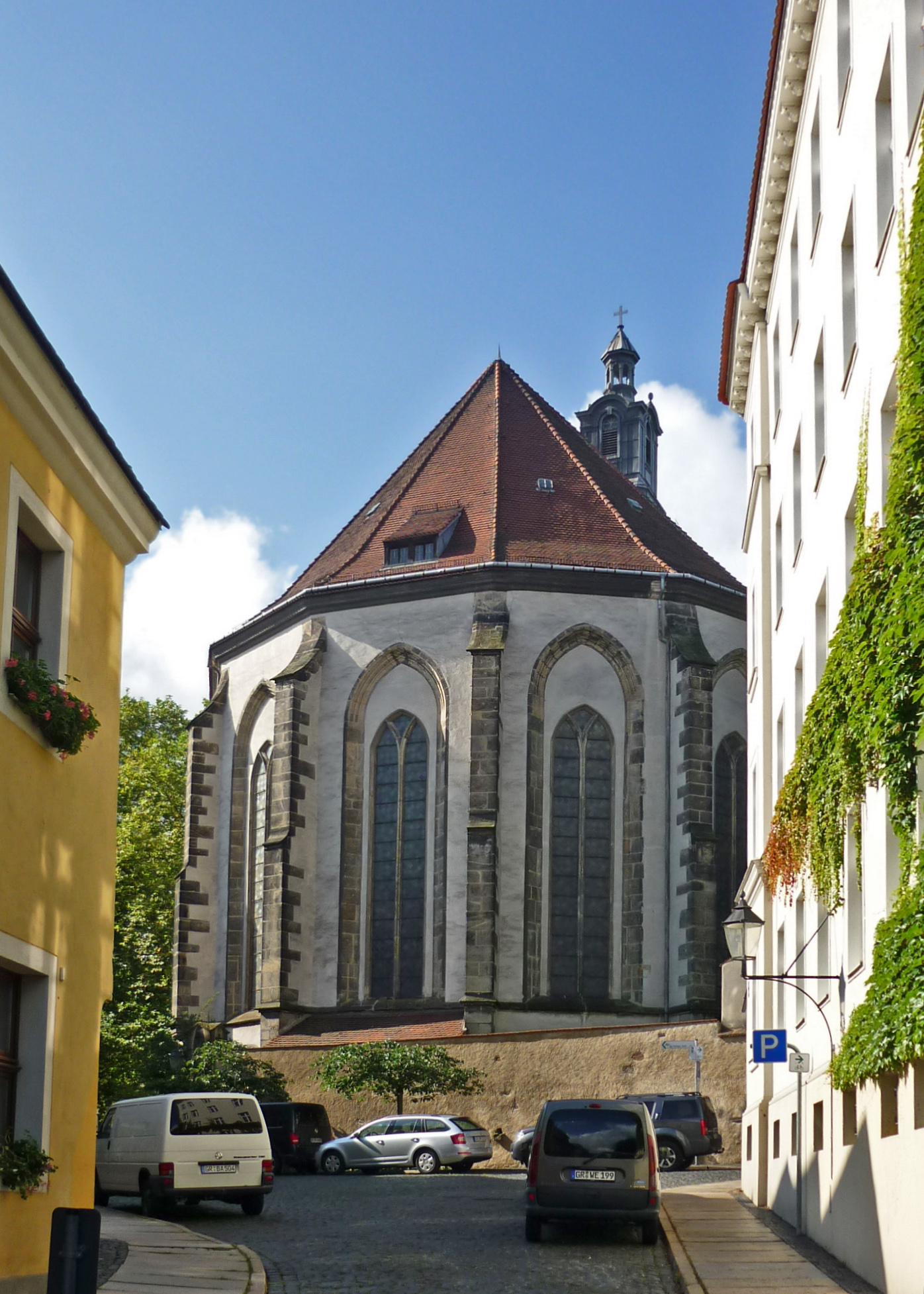 Nikolaikirche in der Nikolaivorstadt von Görlitz